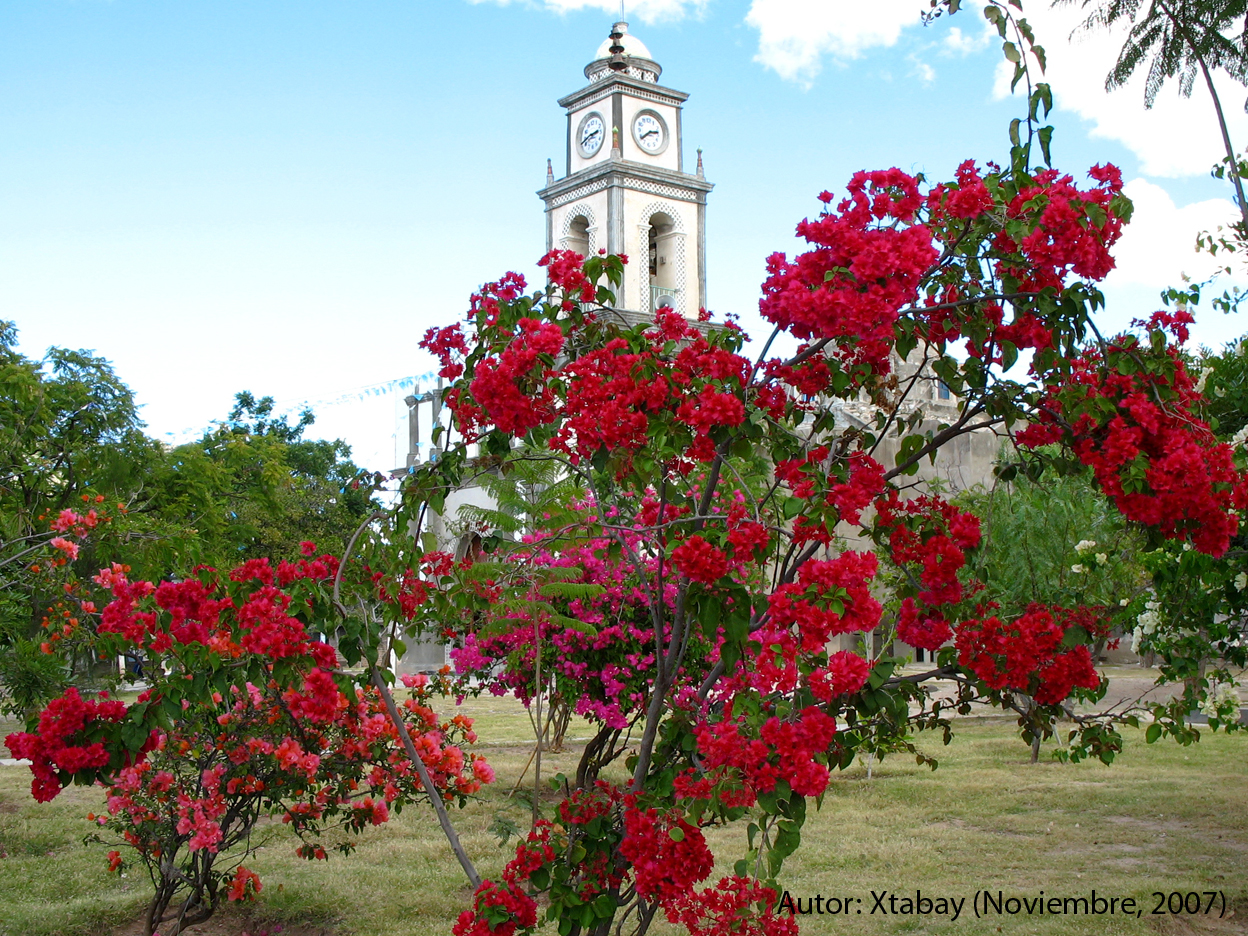 Imágen de la iglesia de la Virgen del Rosario desde la plaza central de EL Rosario Micaltepec, Puebla. México.